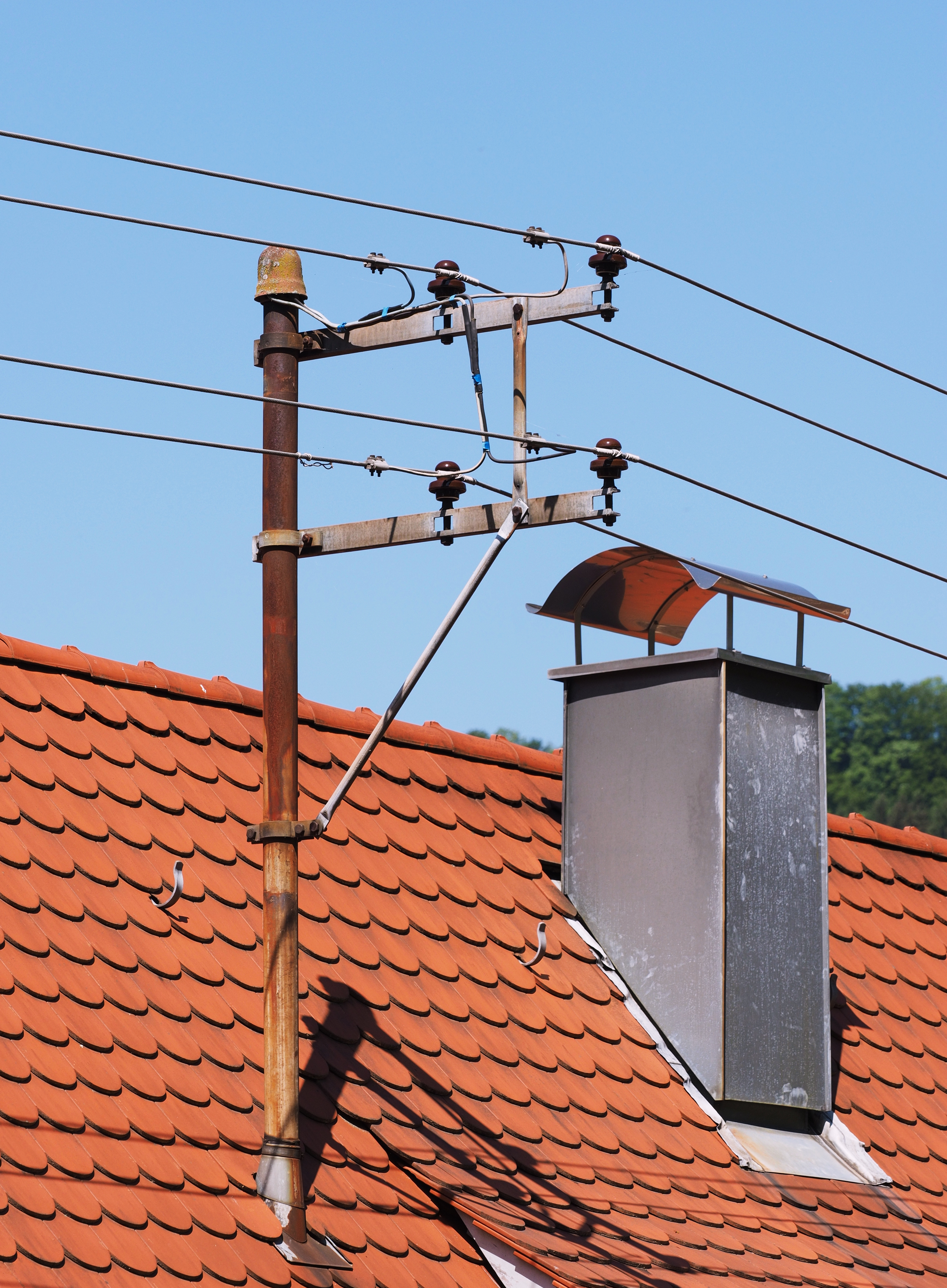 Dachständer auf einem Wohnhaus in Lauterstein-Weißenstein